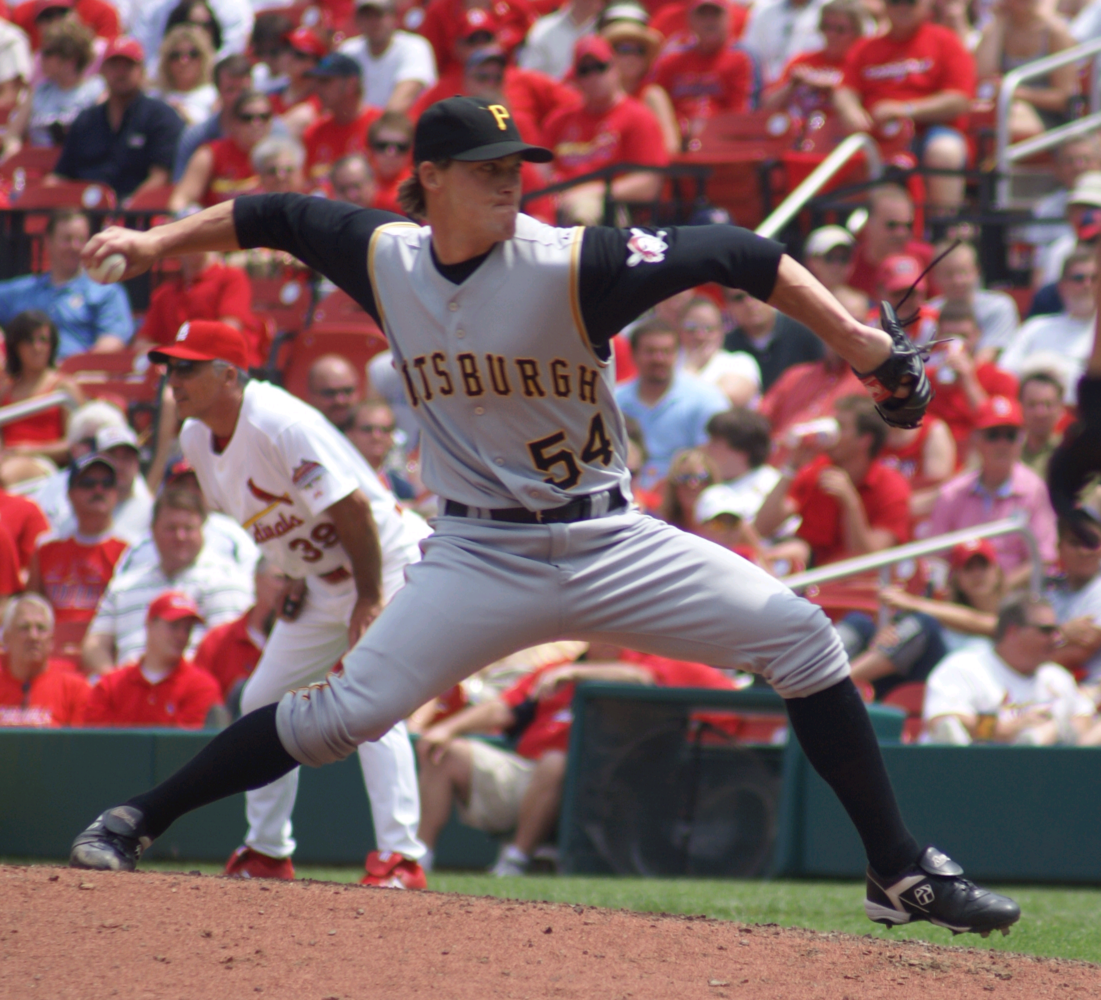 Jonah Bayliss